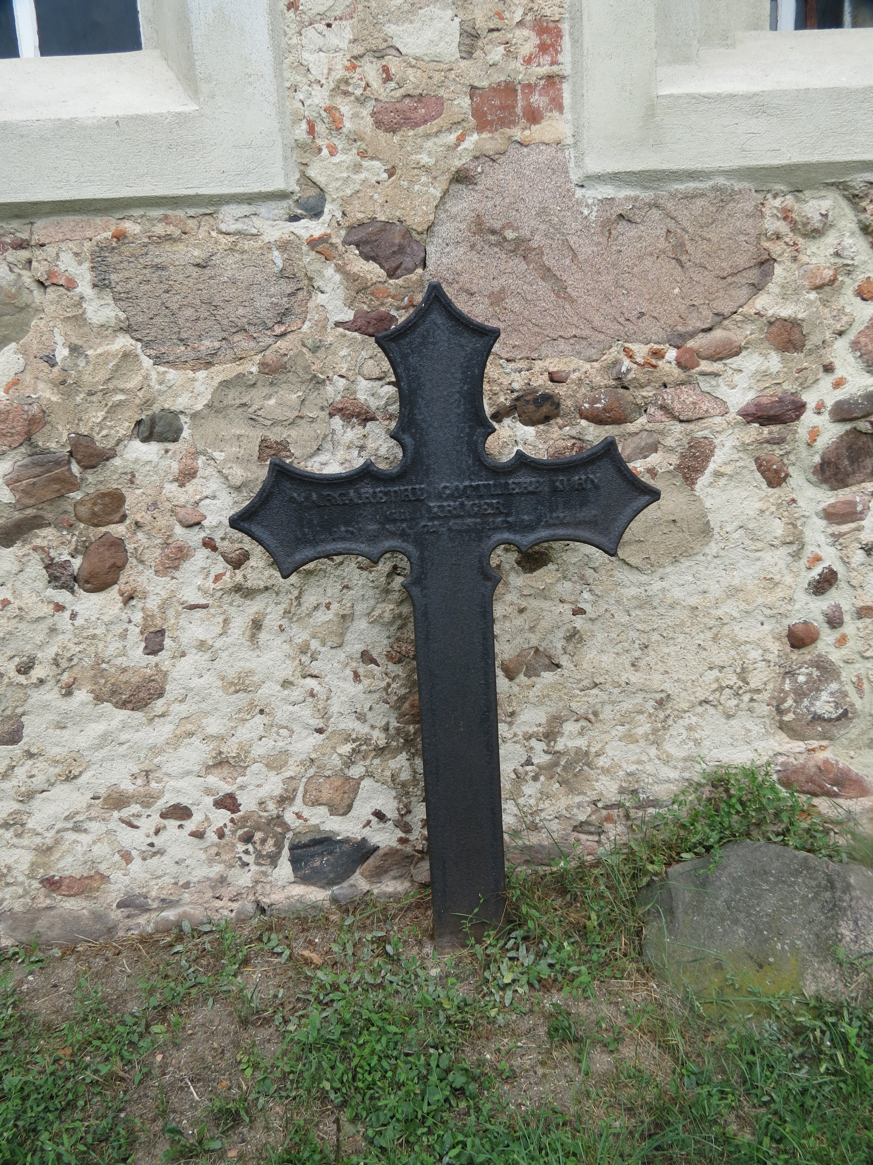 Grabkreuz der Margarethe Friederike Gottliebe Korn geb. Krüger an der Ostseite der Dorfkirche Laubst, Ortsteil der Stadt Drebkau, Landkreis Spree-Neiße, Brandenburg